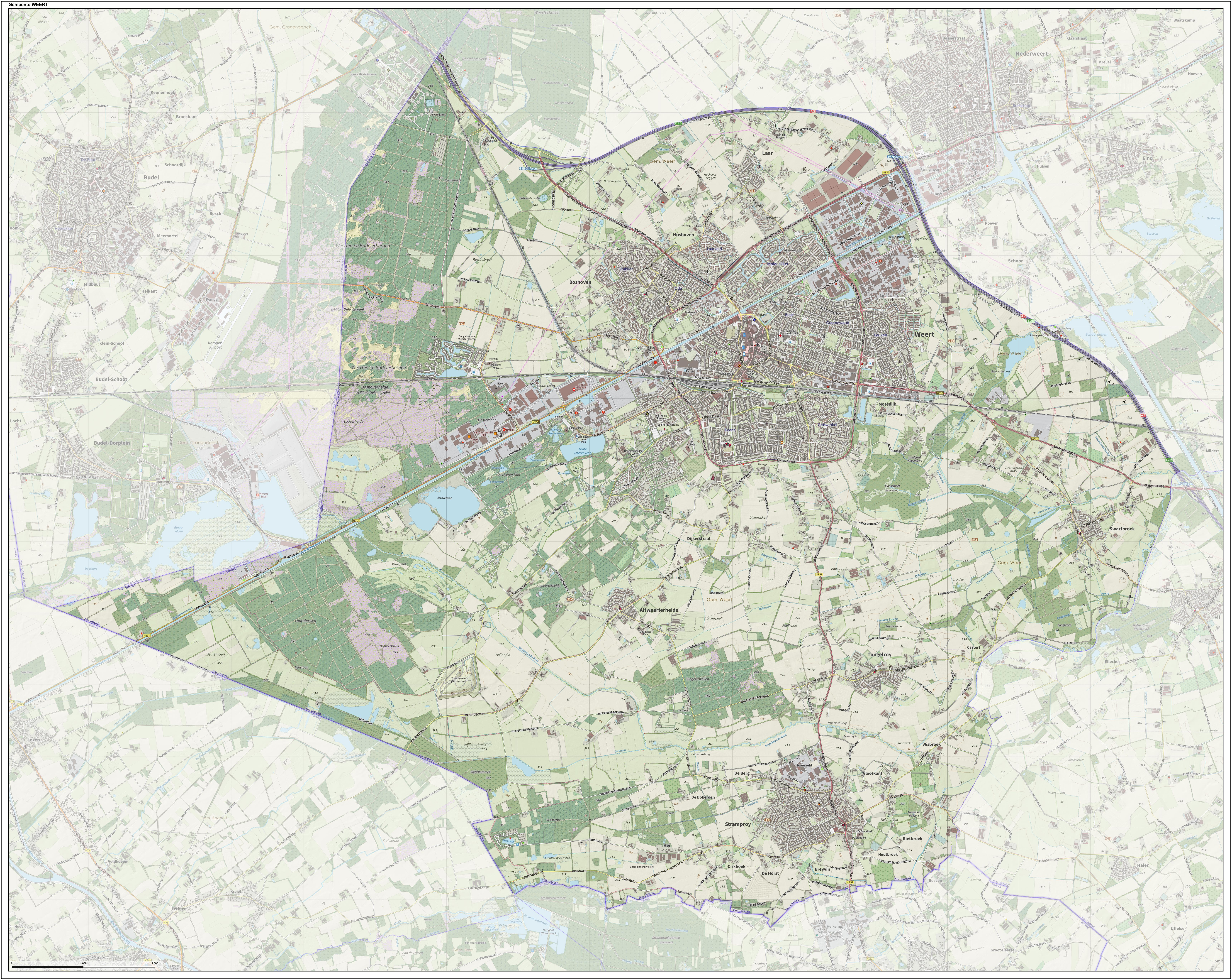 Topografische gemeentekaart. Resolutie: 400 pixels/km. Kaartbeeld samengesteld uit de open geodata van de Top10NL en Top25namen (Kadaster), Creative Commons-BY licentie. Gebouwvlakken uit open geodata BAG extract. Wegen uit de OpenStreetMap, OpenStreetMap community. Reliëfschaduw uit de Actuele Hoogtekaart AHN2. Samenstelling en kleurenschema: Jan-Willem van Aalst, met QGIS. Zie ook de Legenda.